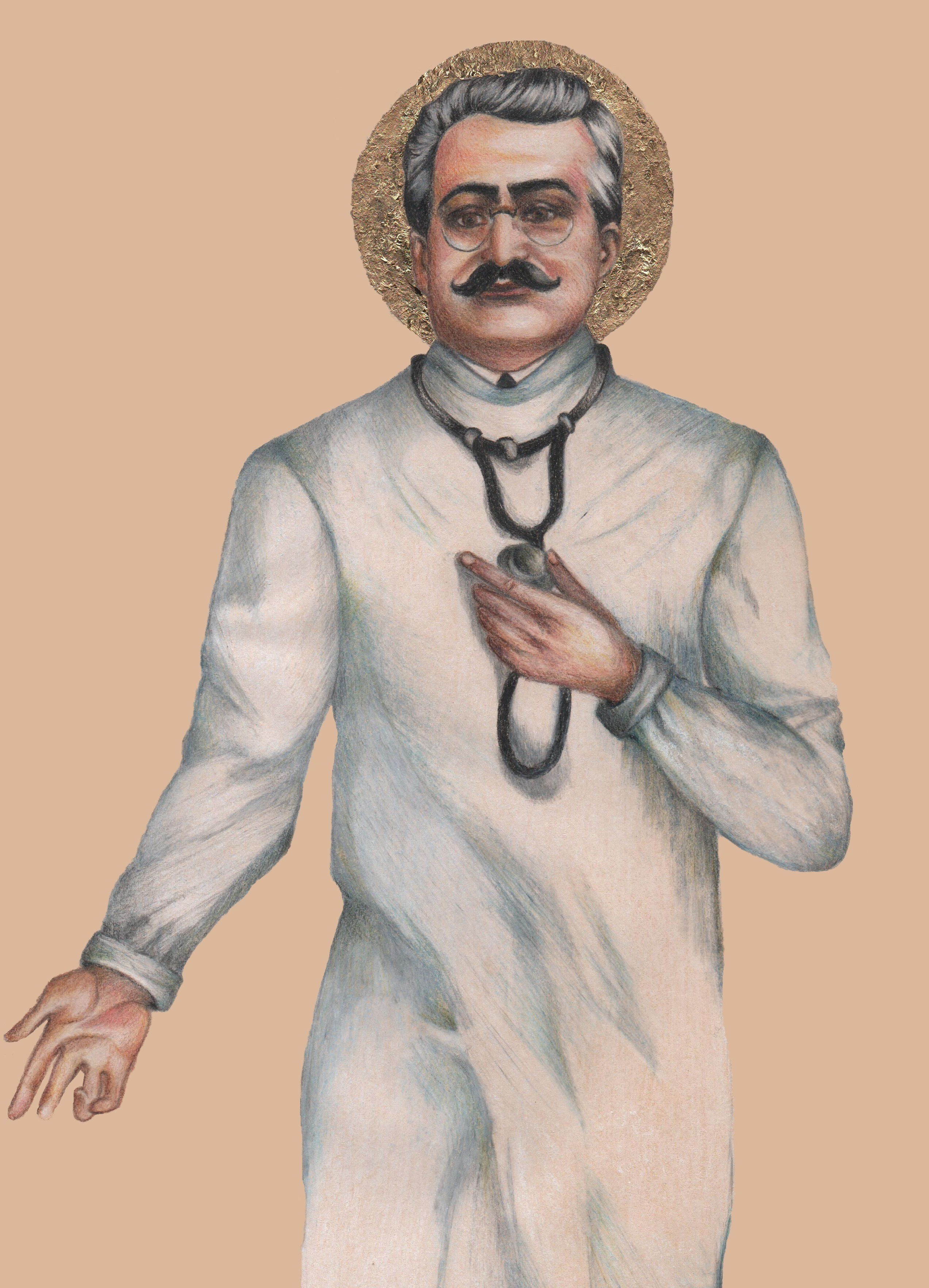 San Giuseppe Moscati, illustrazione di Daniela Matarazzo